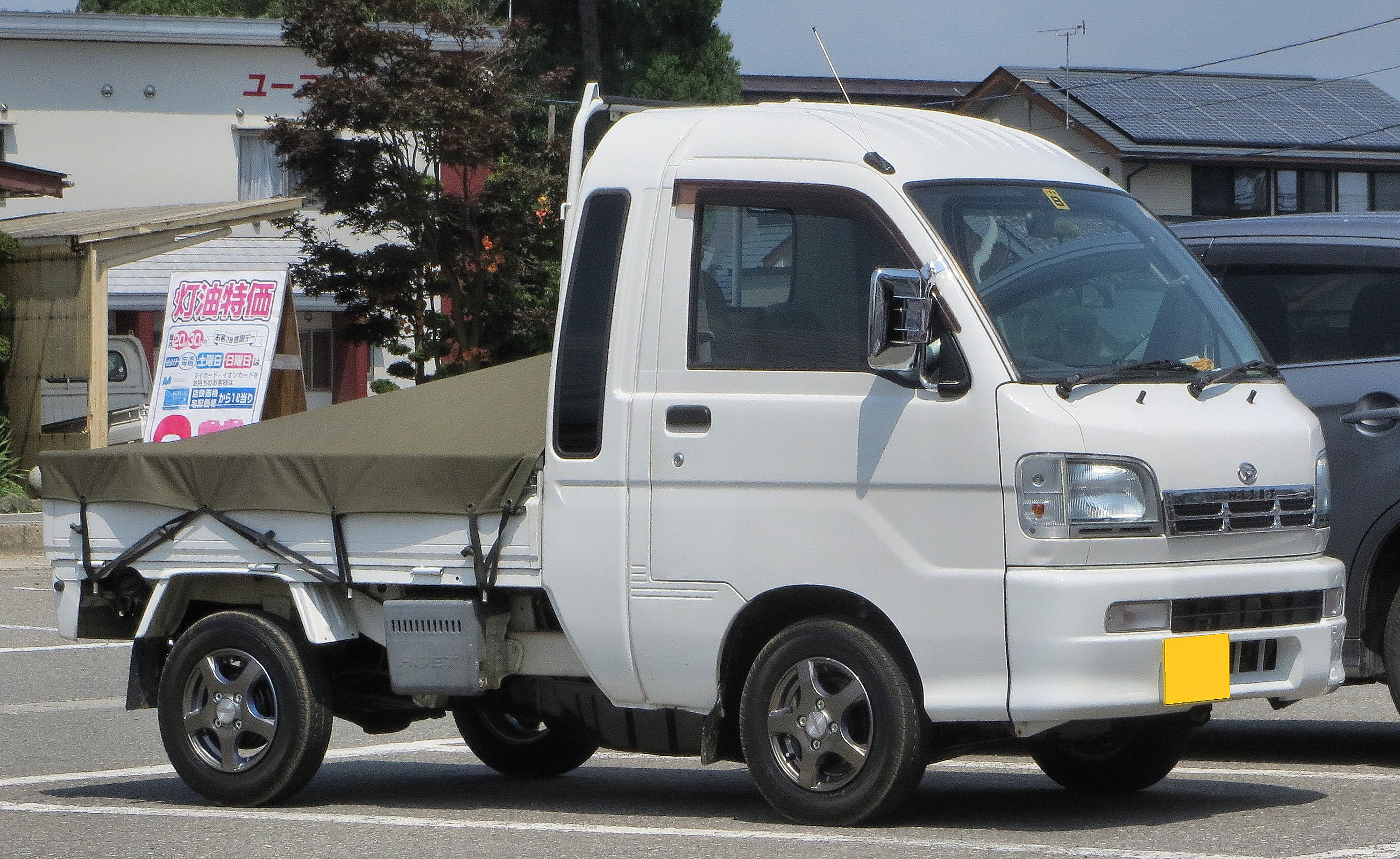 ダイハツハイゼットジャンボ 4WD 5MT 前期型